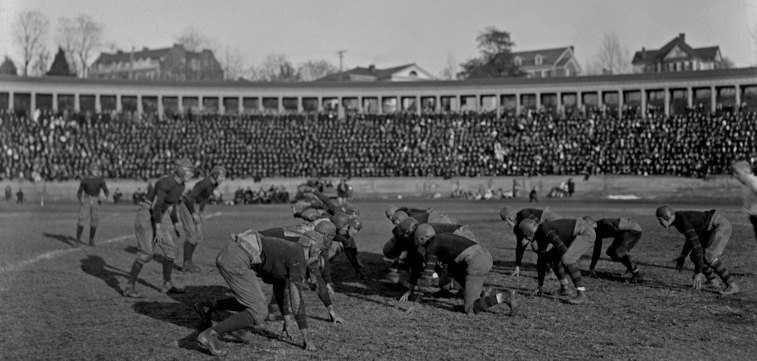 Virginia vs. Vanderbilt football game